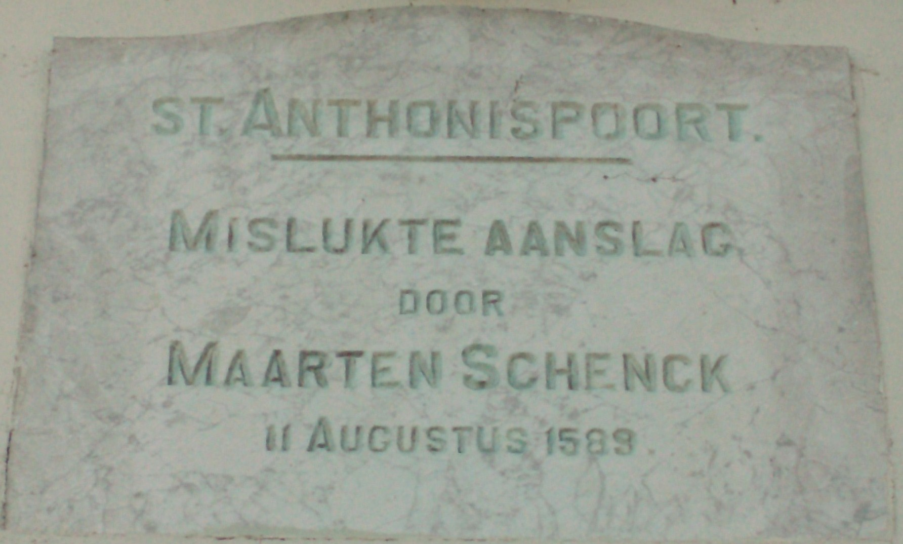 Gedenksteen boven de Anthonispoort voor de Aanslag op Nijmegen op 11 augustus 1589 door Maarten Schenk van Nydeggen.